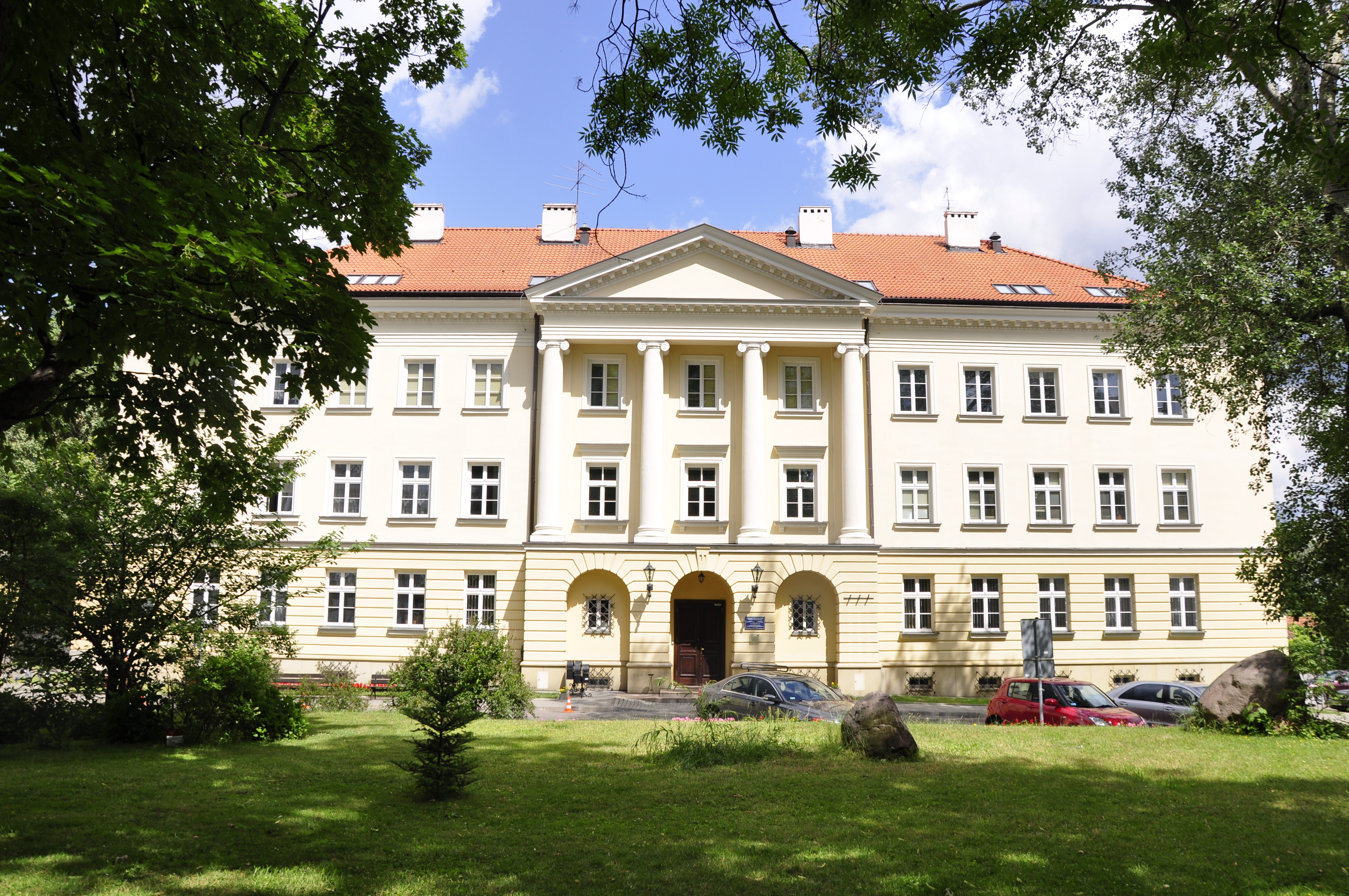 Warschau, Campus der Universität Warschau